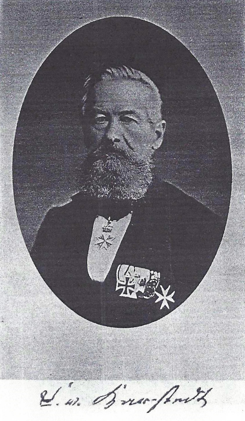 Signierte Porträtfotografie von Carl Otto Sigismund von Karstedt (1811-1888)